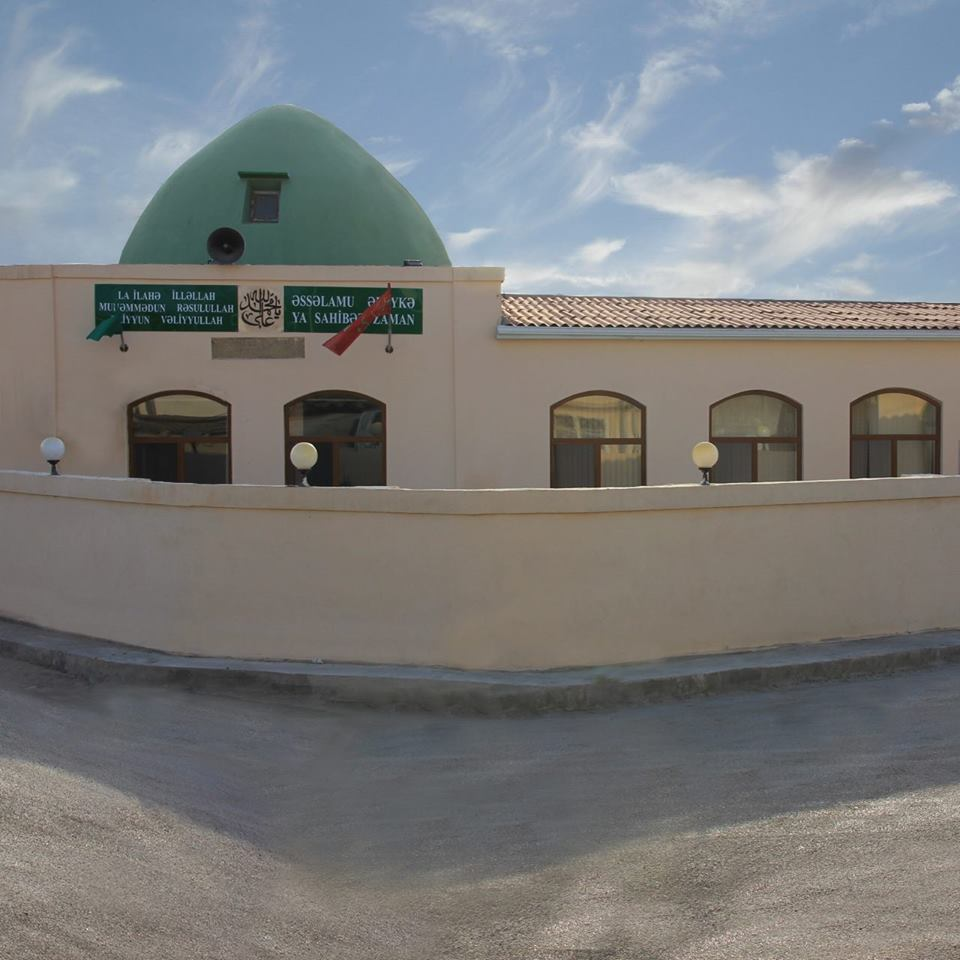 eilhe